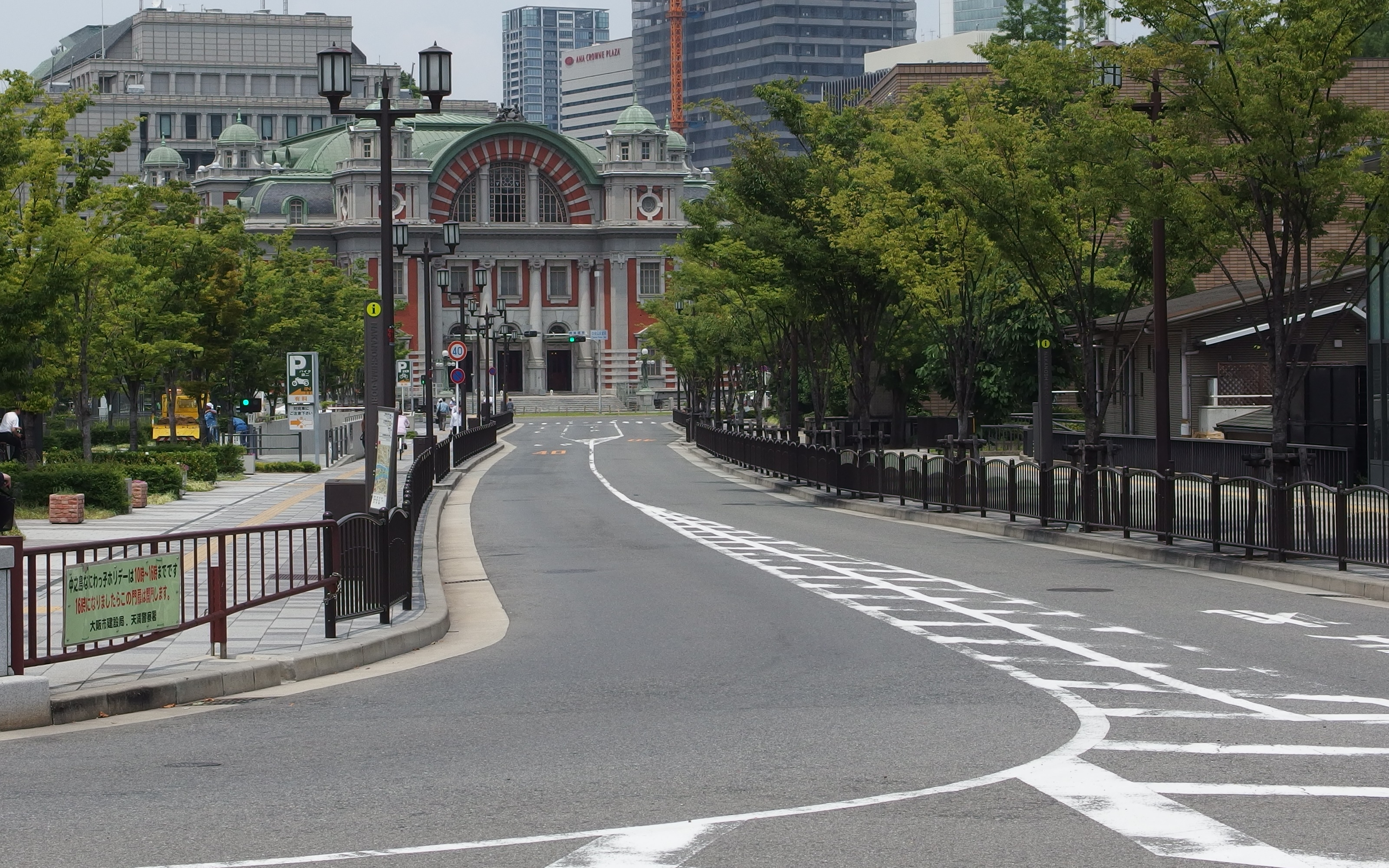 中之島通・中央公会堂付近